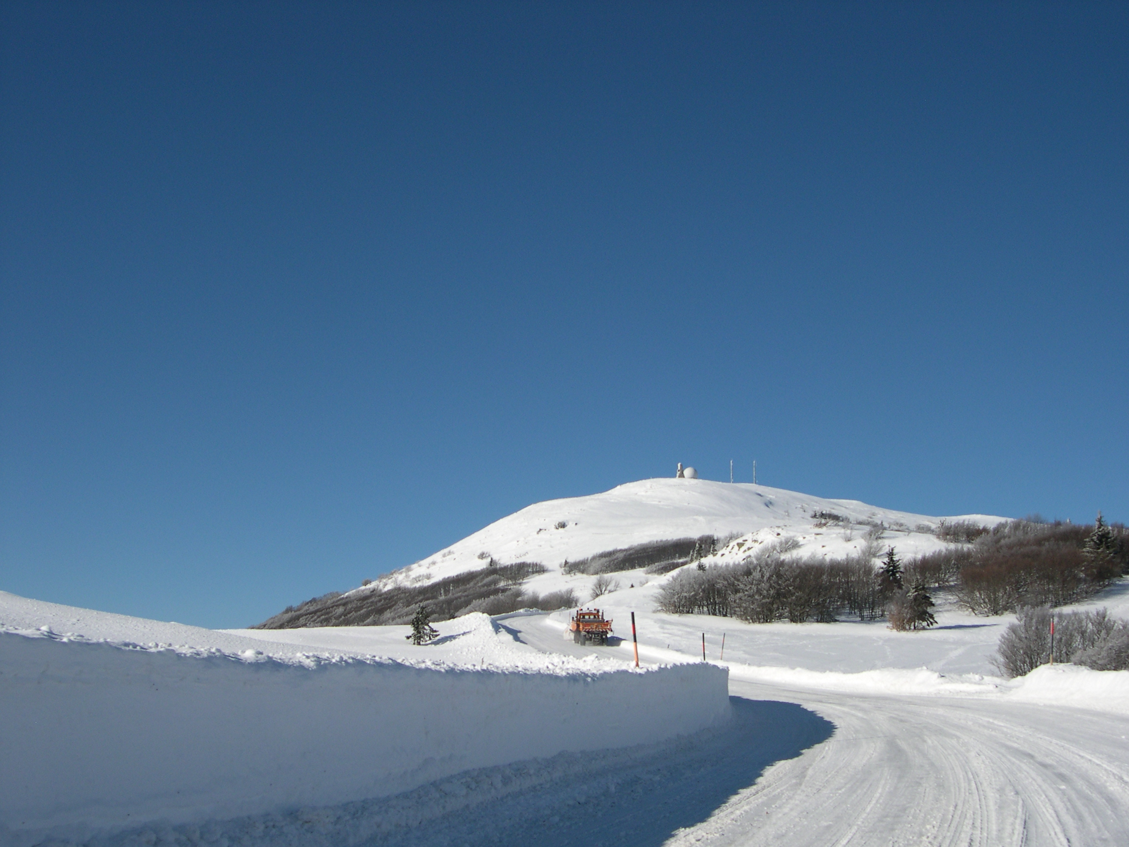 Vue sur le sommet du Grand-Ballon, point culminant des Vosges en Alsace, Haut-Rhin.